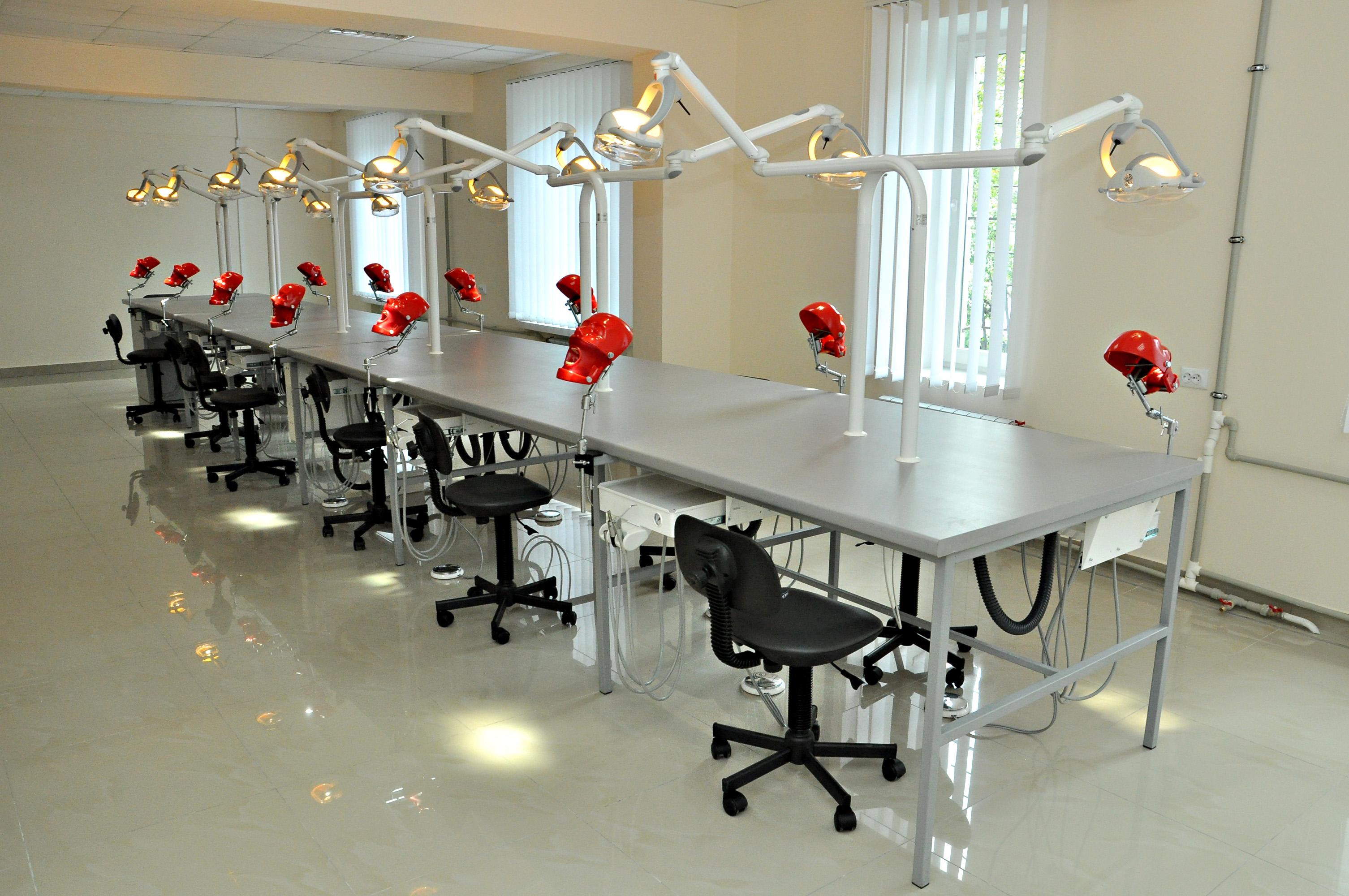 Фантомний клас стоматологічного факультету Тернопільського державного медичного університету імені І. Я. Горбачевського.